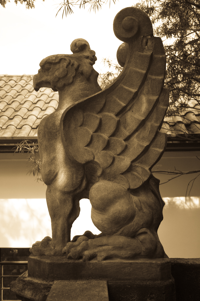 Um dos ornamentos em estilo grego no Parque Residencial Savóia, em São Paulo (SP)